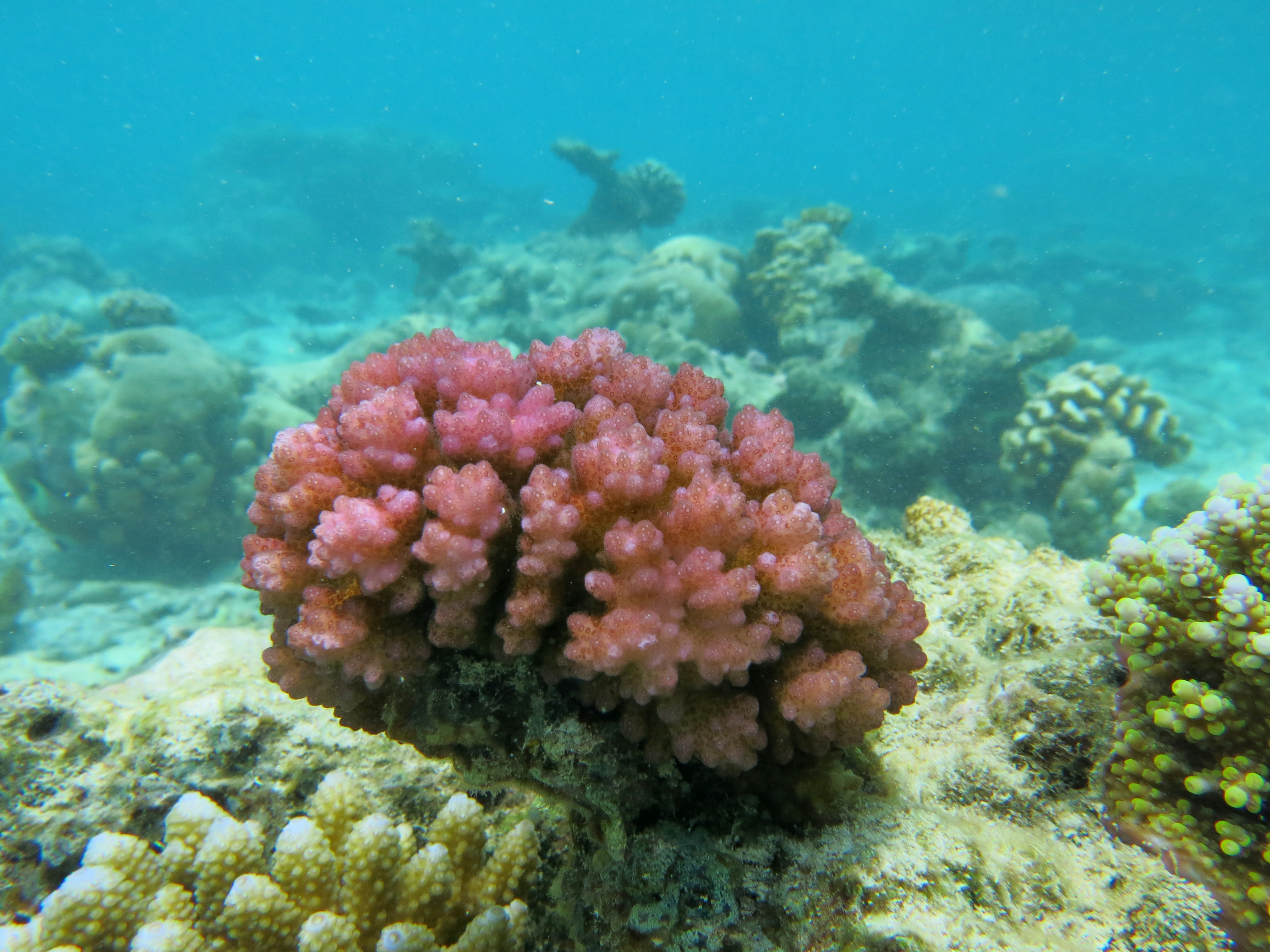 Corail verruqueux (Pocillopora damicornis) sur le platier nord-est de Landaagiraavaru (Maldives, atoll de Baa).